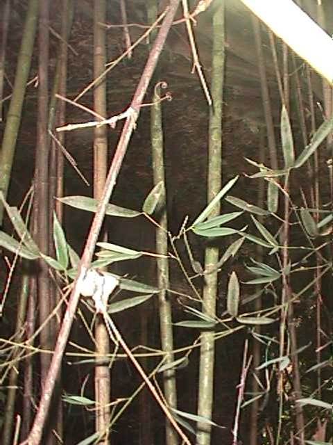 Lecho de la Quebrada La Boyera a nivel del Polideportivo (Bambu)